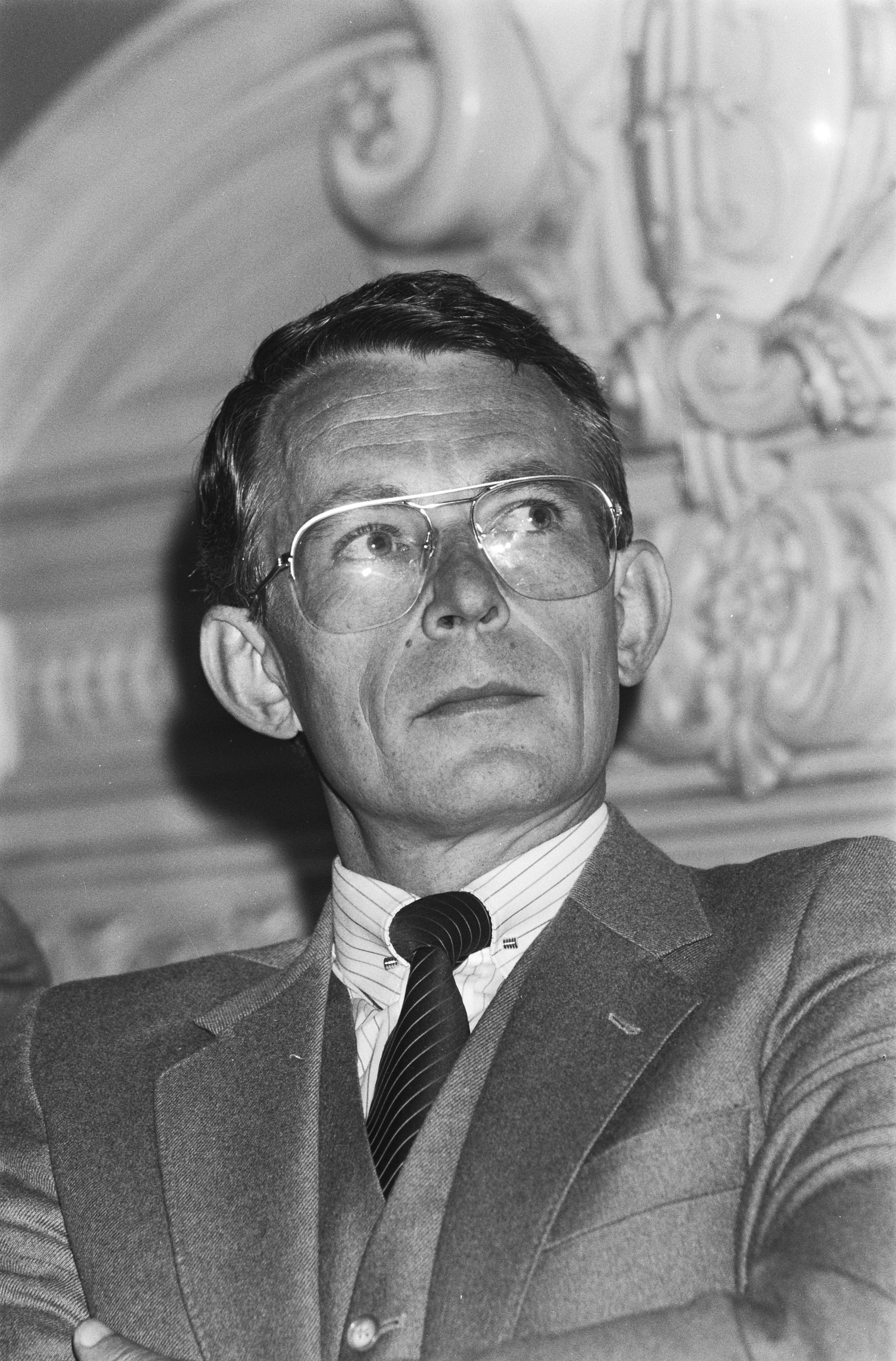 Collectie / Archief : Fotocollectie Anefo Reportage / Serie : [ onbekend ] Beschrijving : Premier Lubbers ontvangt "poly-automatiserings zakboekje van PBNA; prof. Bemelmans , koppen Datum : 1 mei 1984 Trefwoorden : ontvangsten Persoonsnaam : Lubbers, Ruud, Prof. Bemelmans Fotograaf : Croes, Rob C. / Anefo Auteursrechthebbende : Nationaal Archief Materiaalsoort : Negatief (zwart/wit) Nummer archiefinventaris : bekijk toegang 2.24.01.05 Bestanddeelnummer : 932-9534